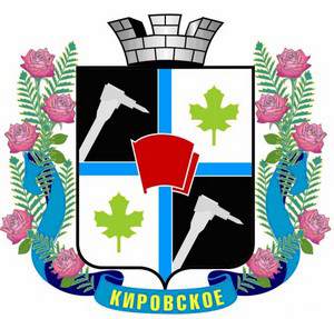 Герб города Кировское (Донецкая область)